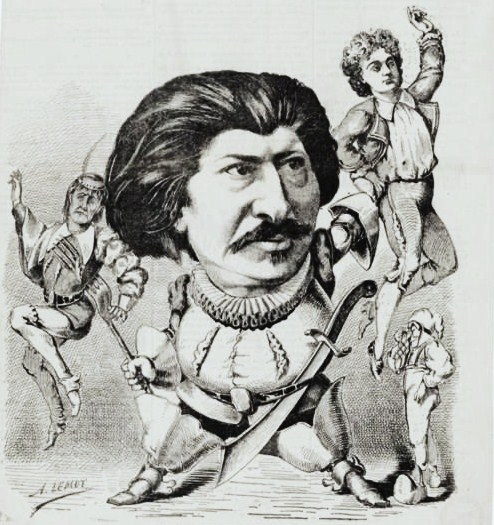 Caricature de Laurent de Rillé président de l'Orphéon de Paris.